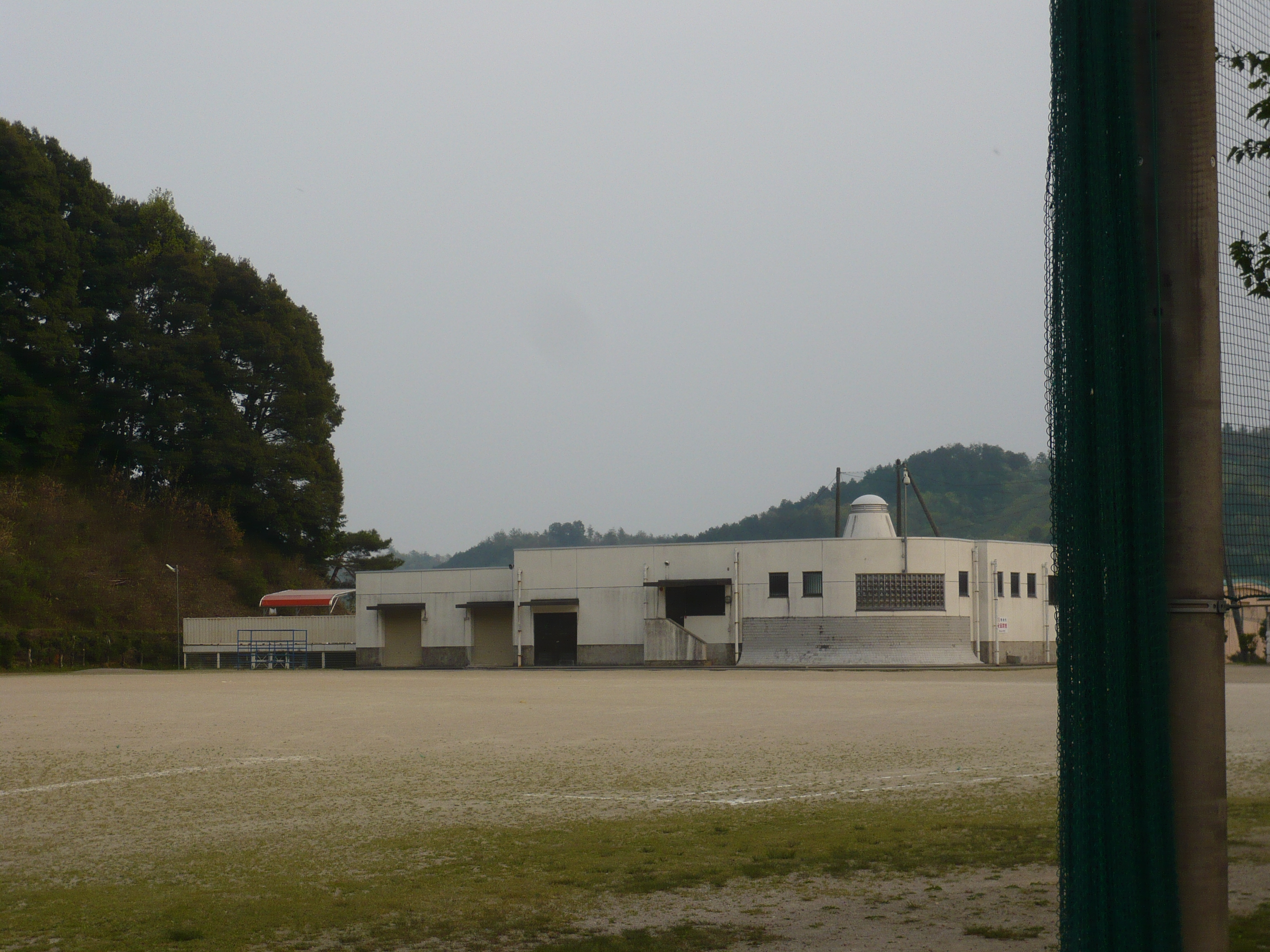 美山小学校（旧西武芸小学校の校舎を使用）